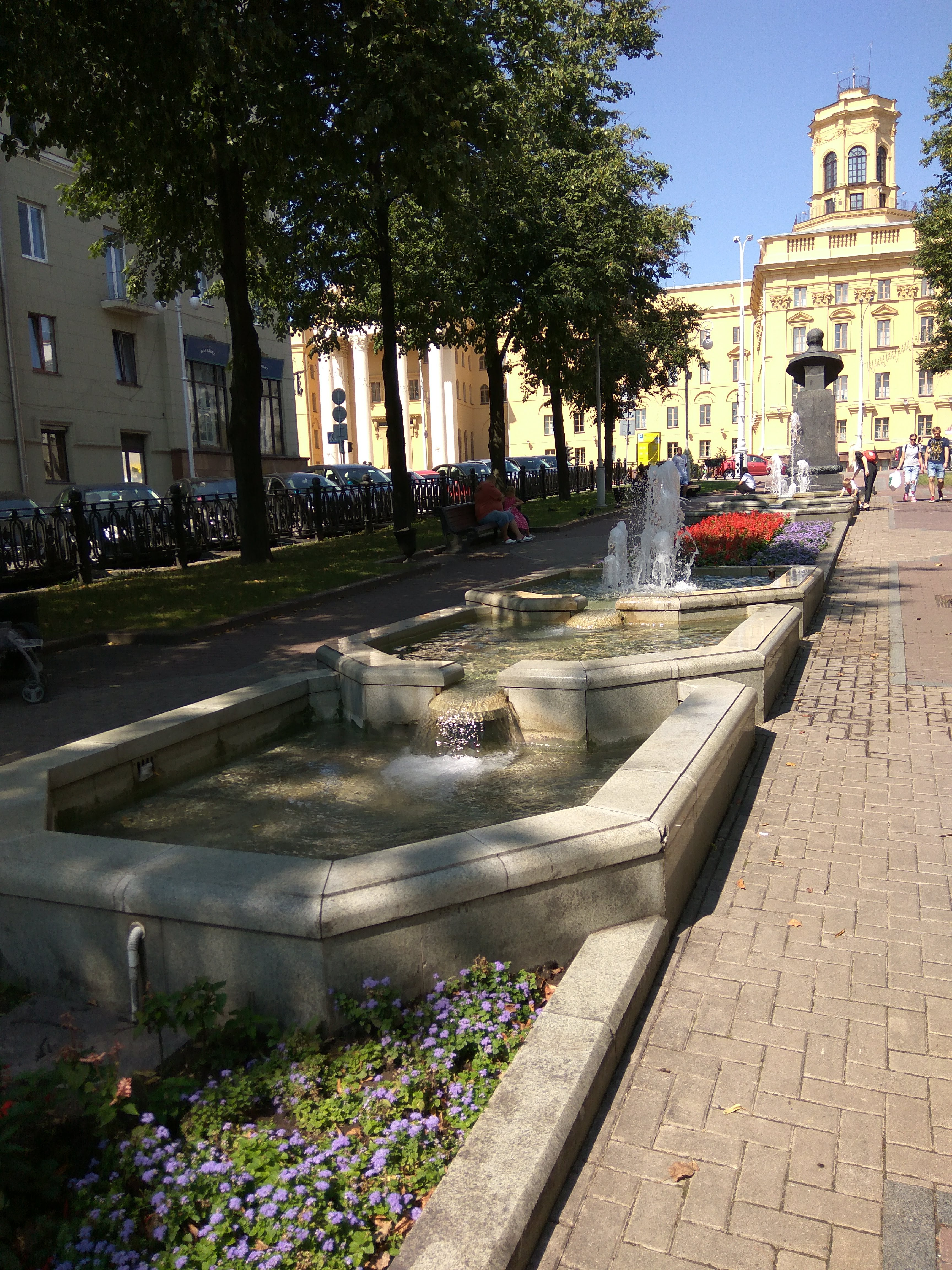 Мінск. Цэнтр у жніўні 2018